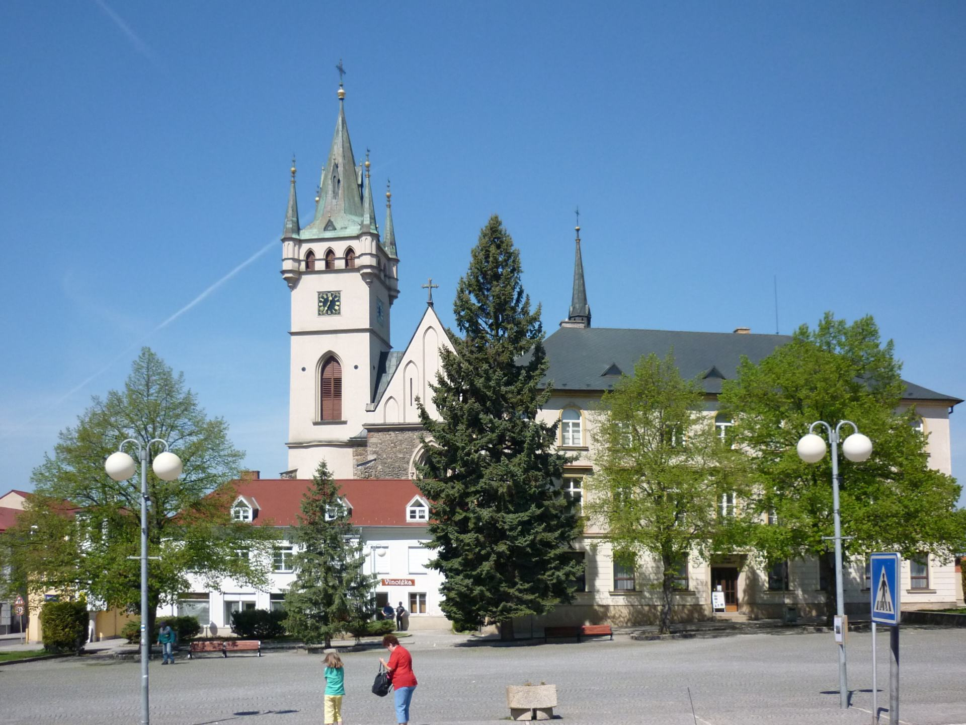 Humpolec